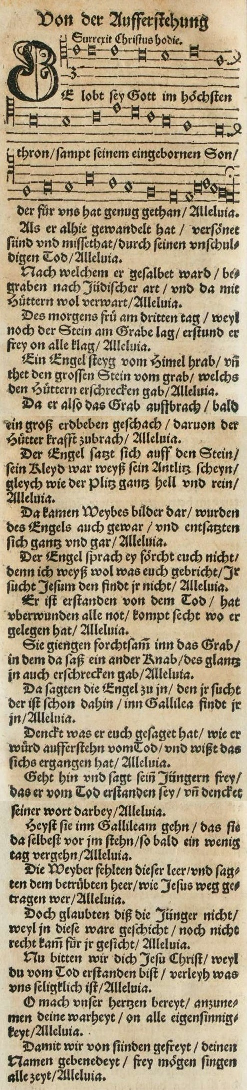 Michael Weiße: Gelobt sei Gott im höchsten Thron, Fassung 1544 mit der Melodie Surrexit Christus hodie